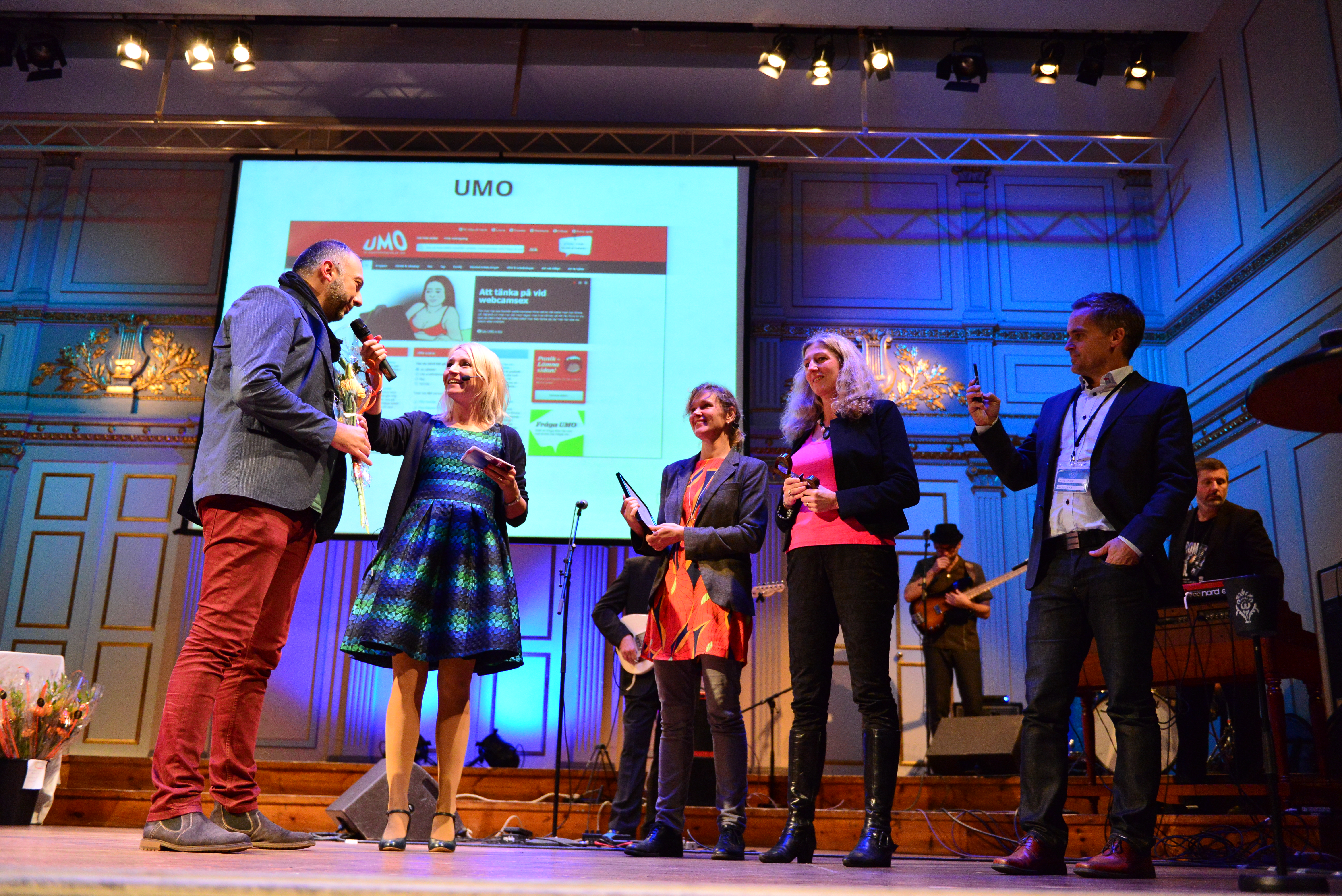 Svenska Publishingdagen 23 oktober 2013. Från vänster: Visar Ulaj, Martina Haag, Love Nordenmark, Lotta Nordhrubulis, Mats Saxer.